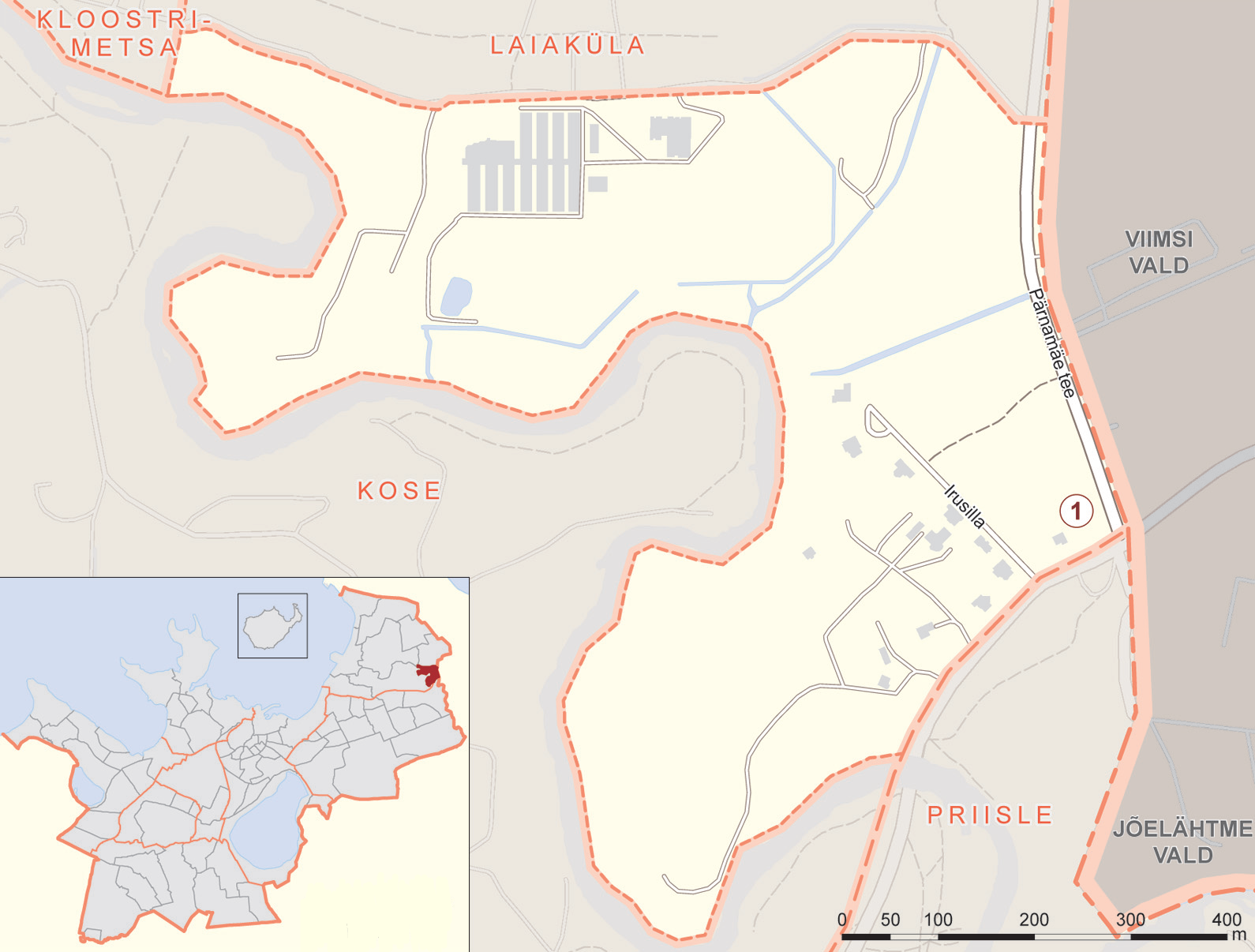 Iru asumi kaart